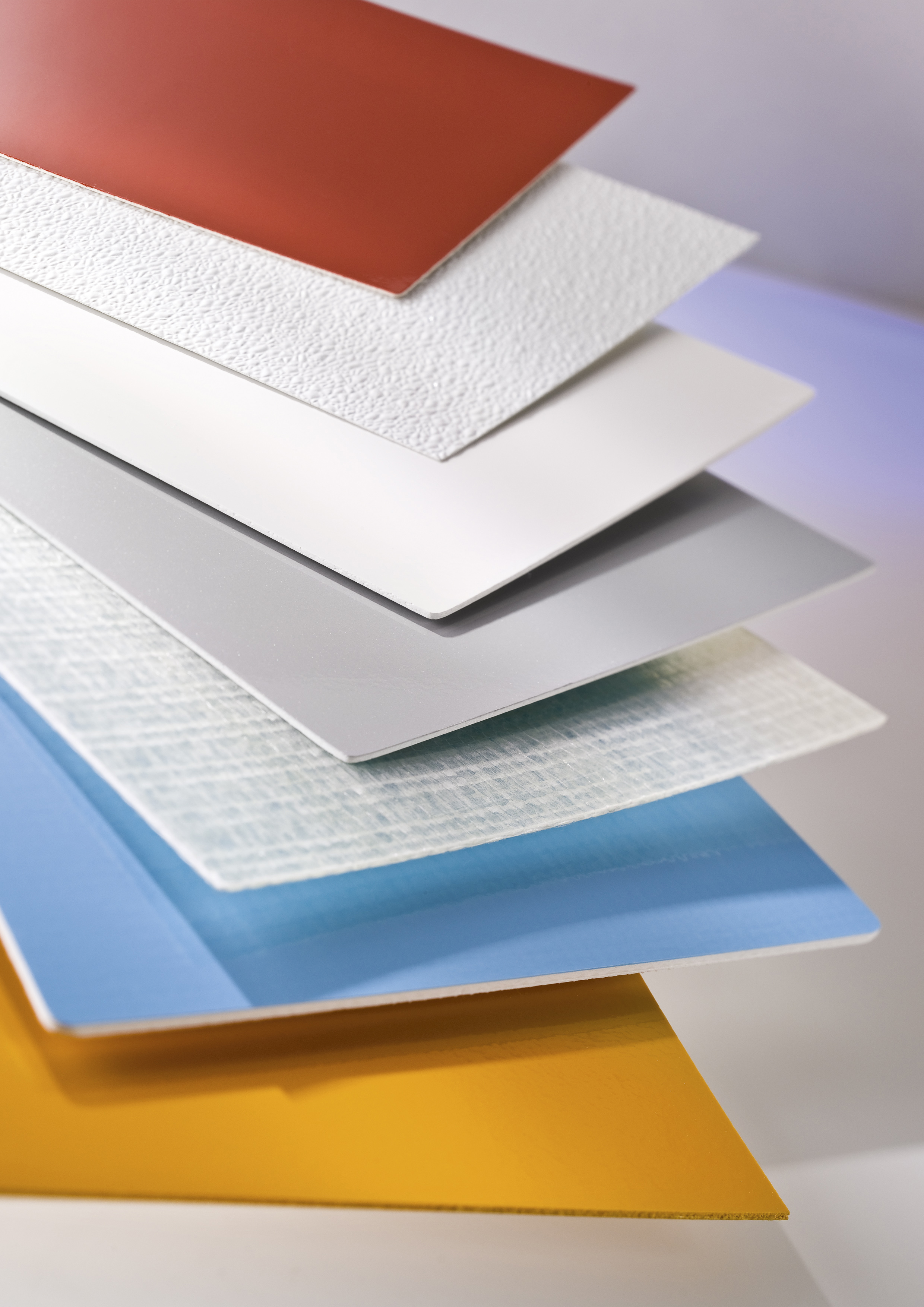 Produktbeispiel der faserverstärkten Kunststoffe